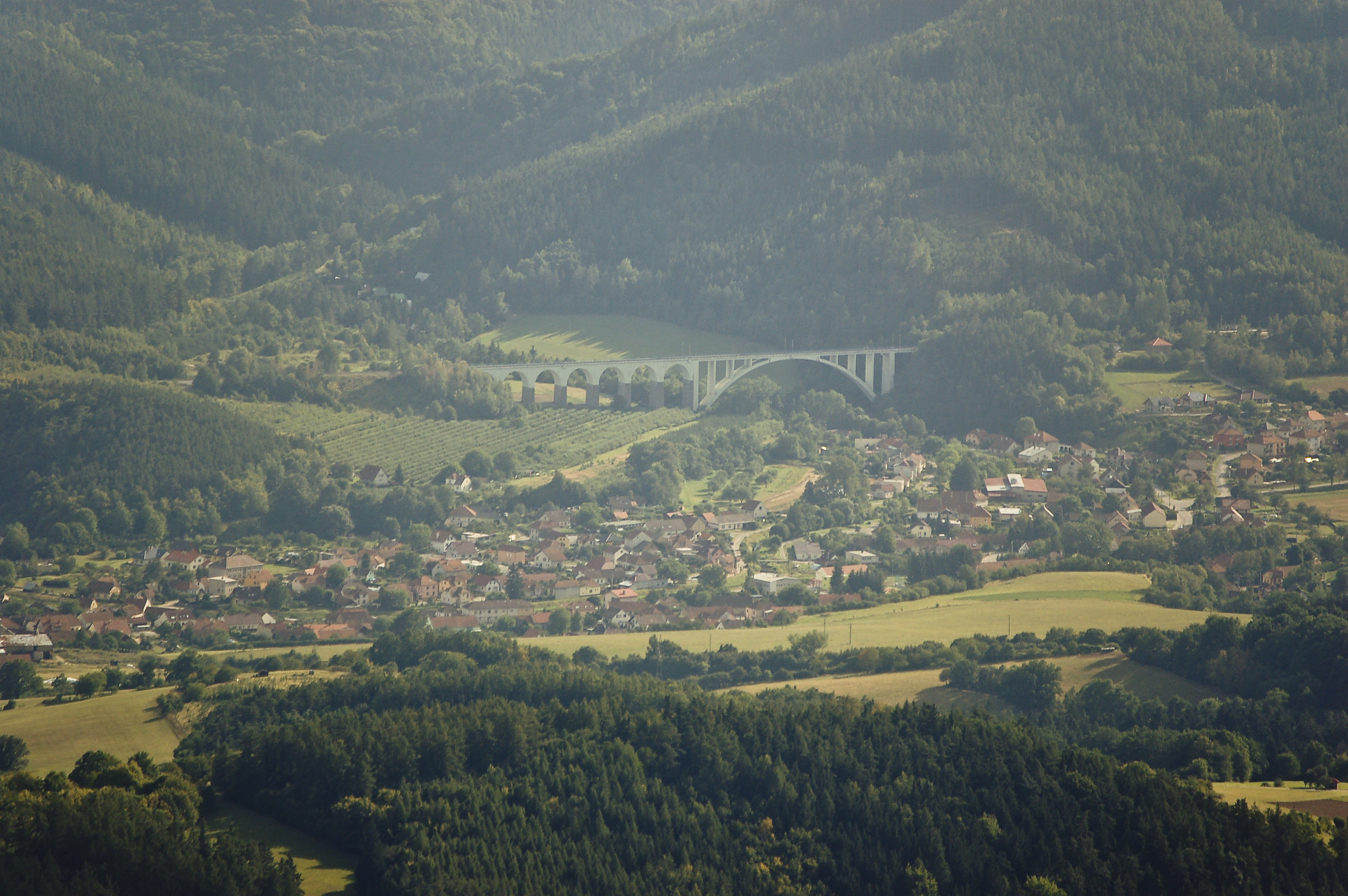 Letecký snímek Dolních Louček